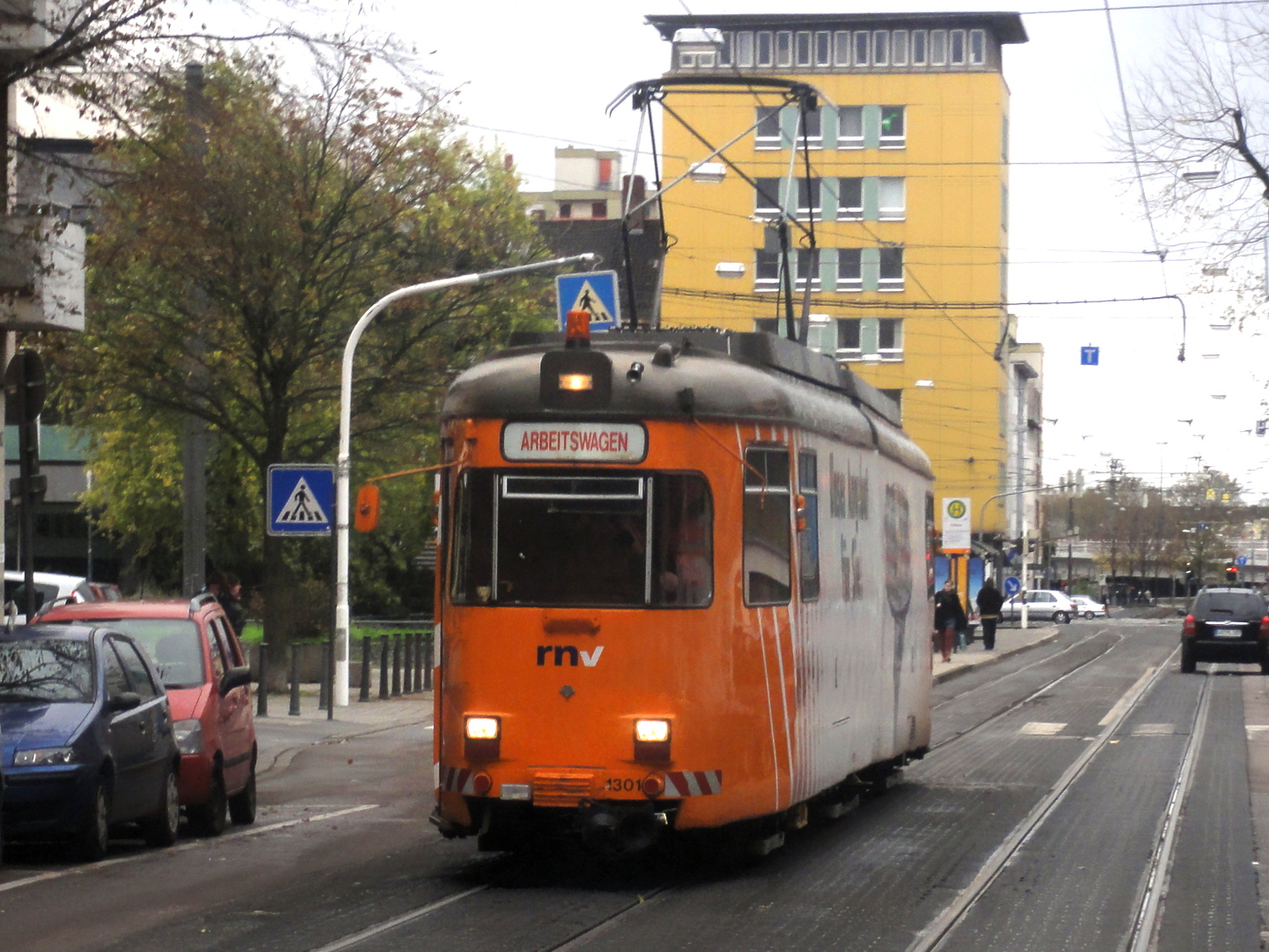 RNV-Arbeitswagen 1301 nahe der Haltestelle Pfalzbau aus einer entgegenkommender Strassenbahn.